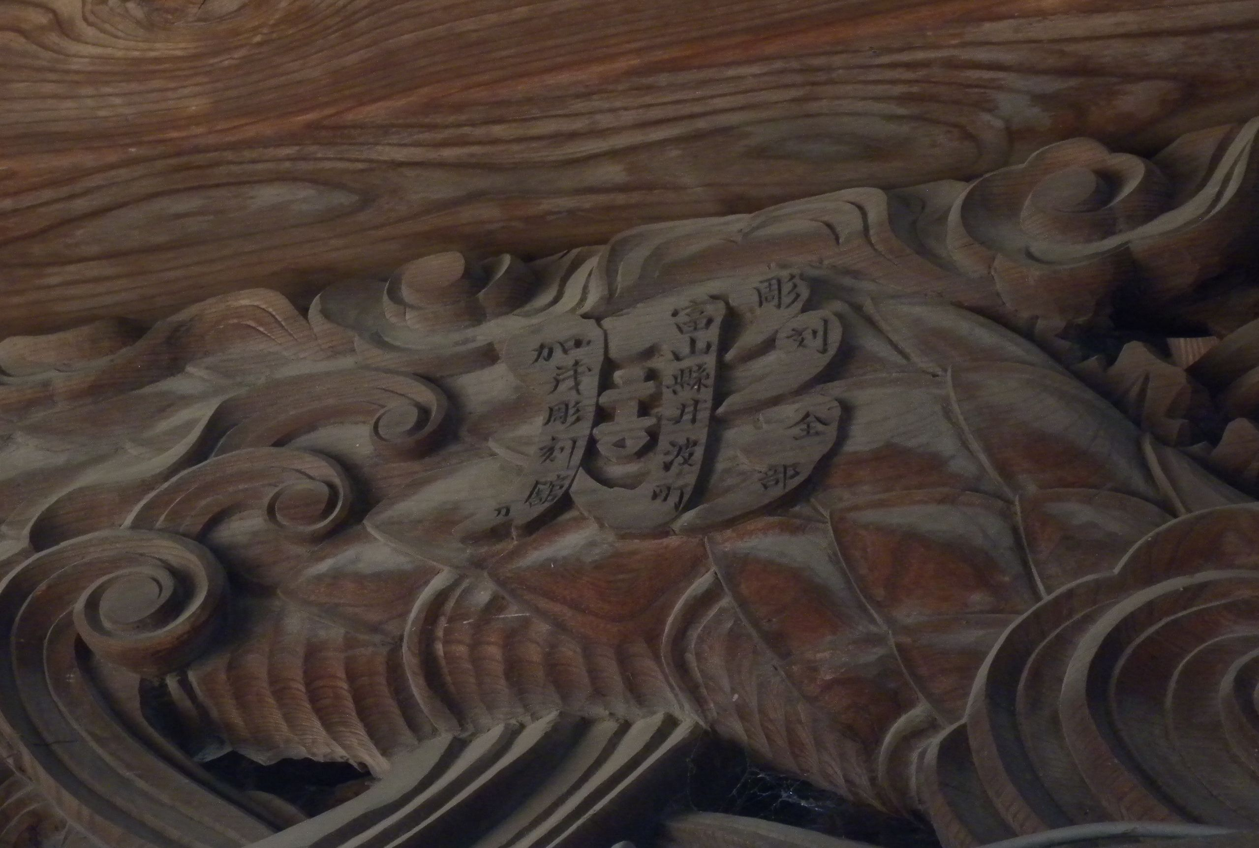 拝殿正面に刻まれた「彫刻全部富山県井波町加茂彫刻館刀」の文字